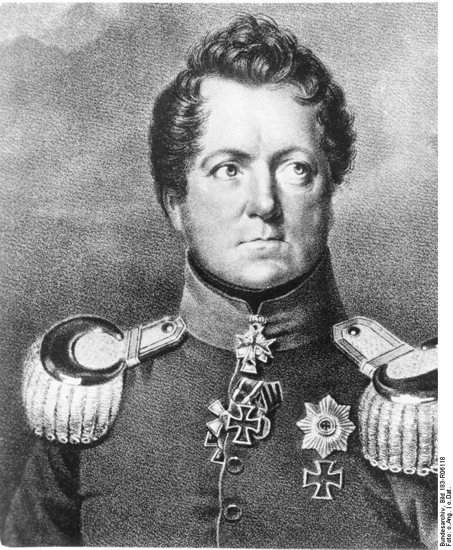 ADN-ZB/Archiv Gneisenau, August Graf Neidhardt von preußischer General (seit 1825 Feldmarschall), einer der hervorragendsten Feldherrn und Militärtheoretiker der Befreiungskriege 1813-15. geb. 27.10.1760 in Schildau bei Torgau gest. 23.8.1831 in Posen (Pozan) Lithographie nach einer Zeichnung von F. Krüger 1576-13